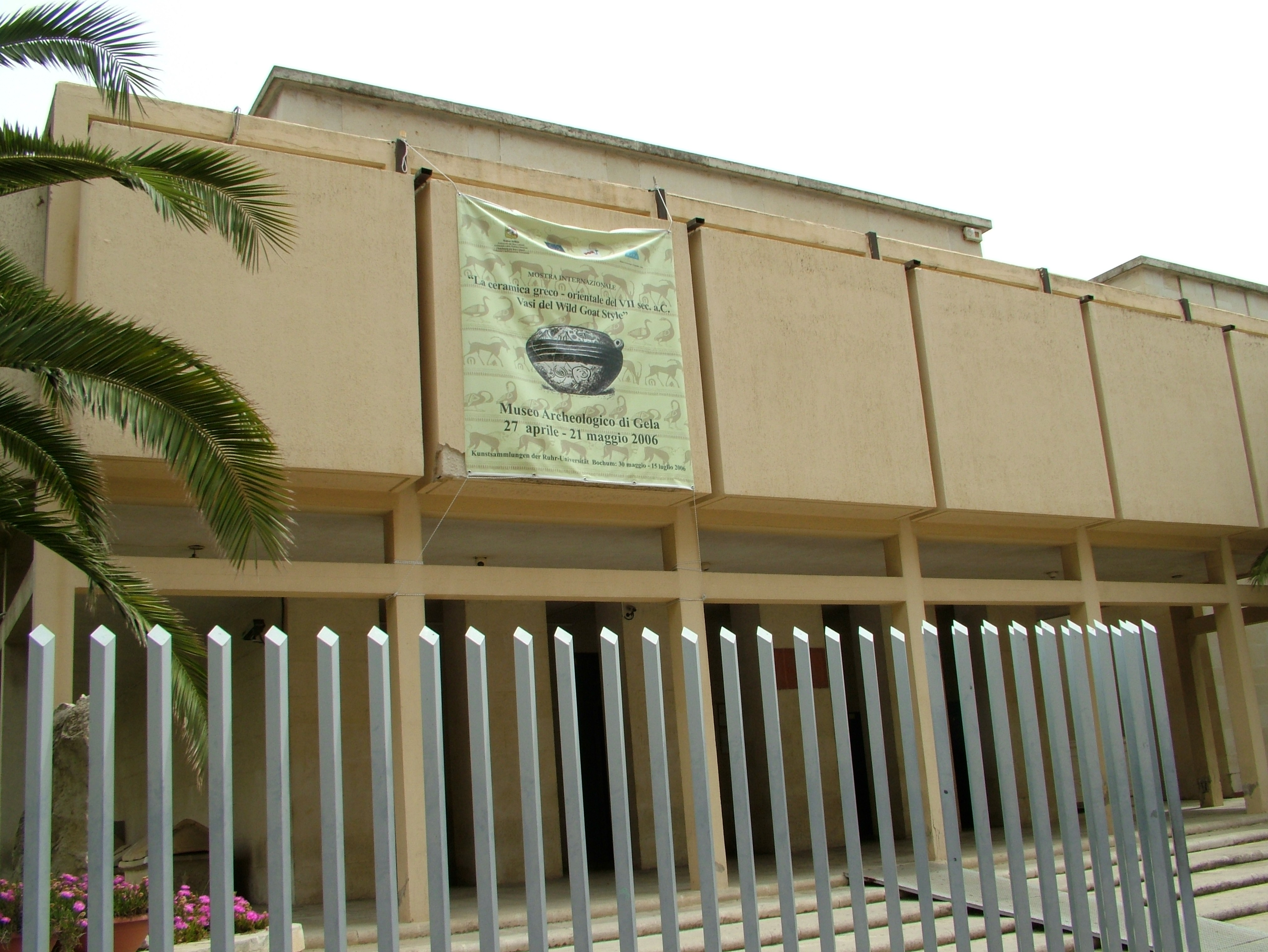 Gela Sizilien Archaelogisches Museum, der Eingang